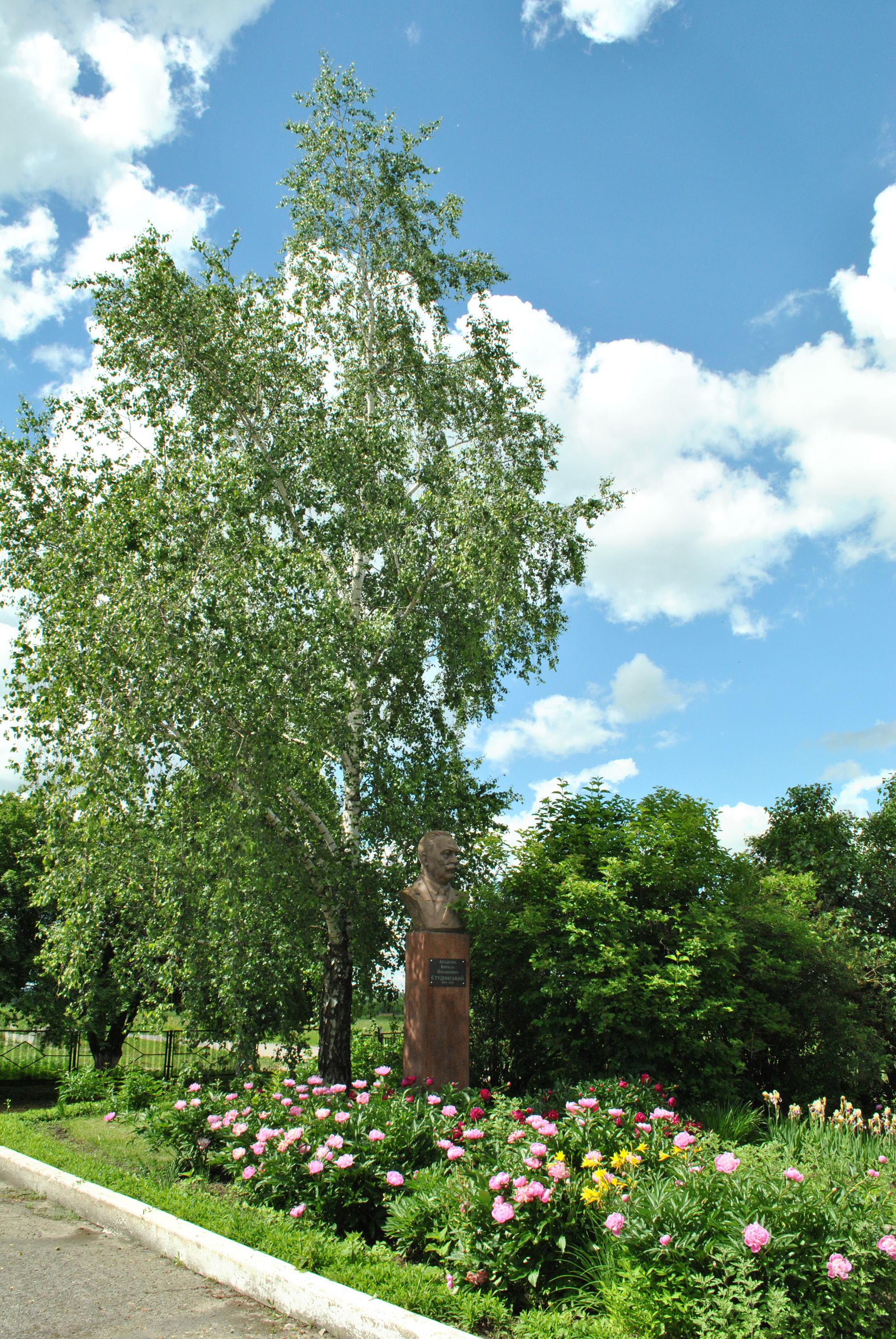 Пам'ятник академіку, мовознавцю, літературознавцю, фольклористу Кирилові Студинському в селі Кип’ячка (біля школи) Тернопільського району Тернопільської області.